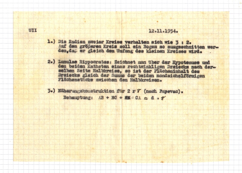 Klassenarbeit einer 10. Klasse (Gymnasium) in Mathematik aus dem Jahre 1954. Die Kopien wurden mit Kohlepapier auf dünnem (erkennbar anhand des daruntergelegten karierten Papiers) Durchschreibepapier angefertigt